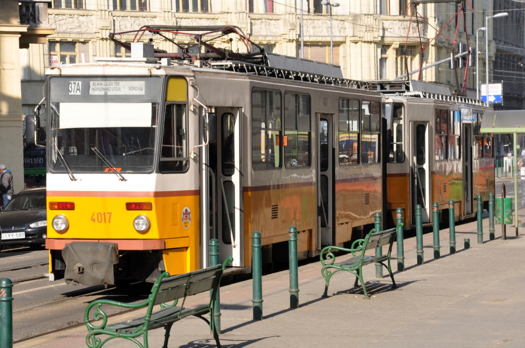 37A villamos